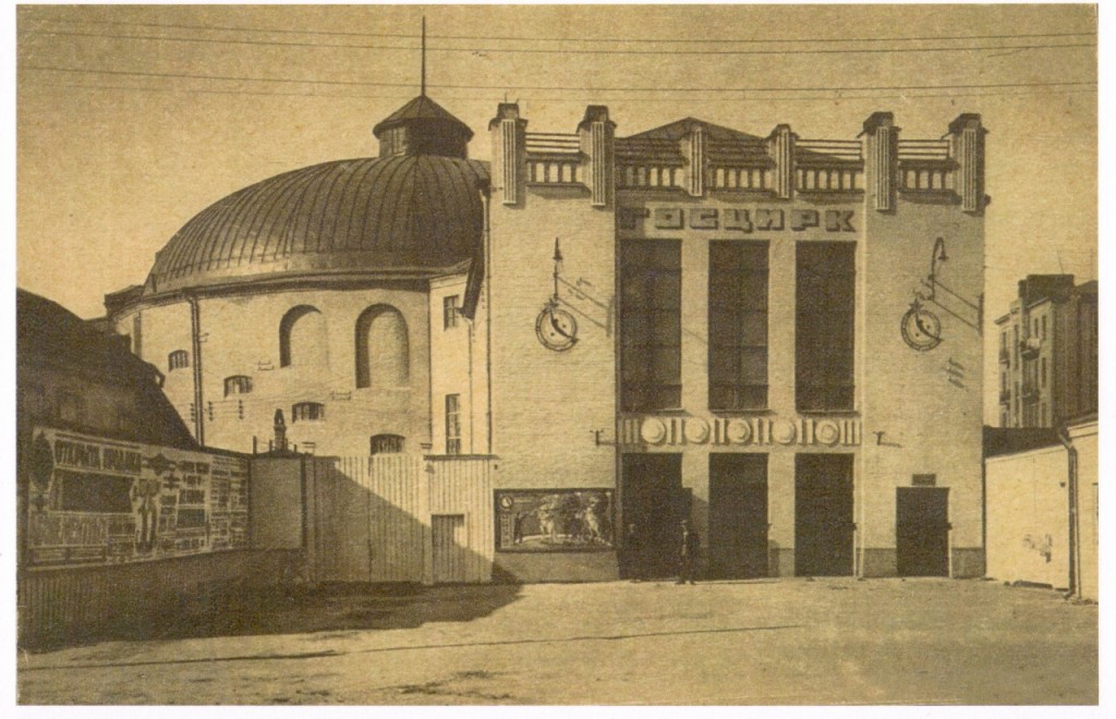 Госцирк на площади Милиционера. Харьков.